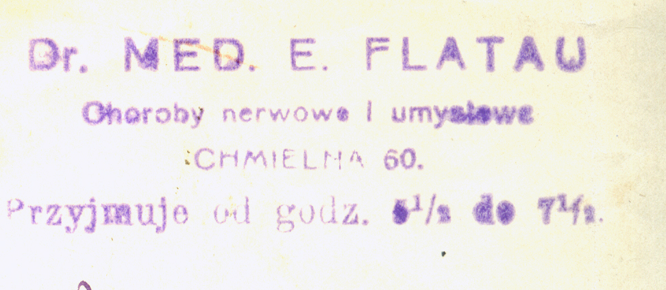 Pieczątka lekarska z 27 sierpnia 1920 roku.